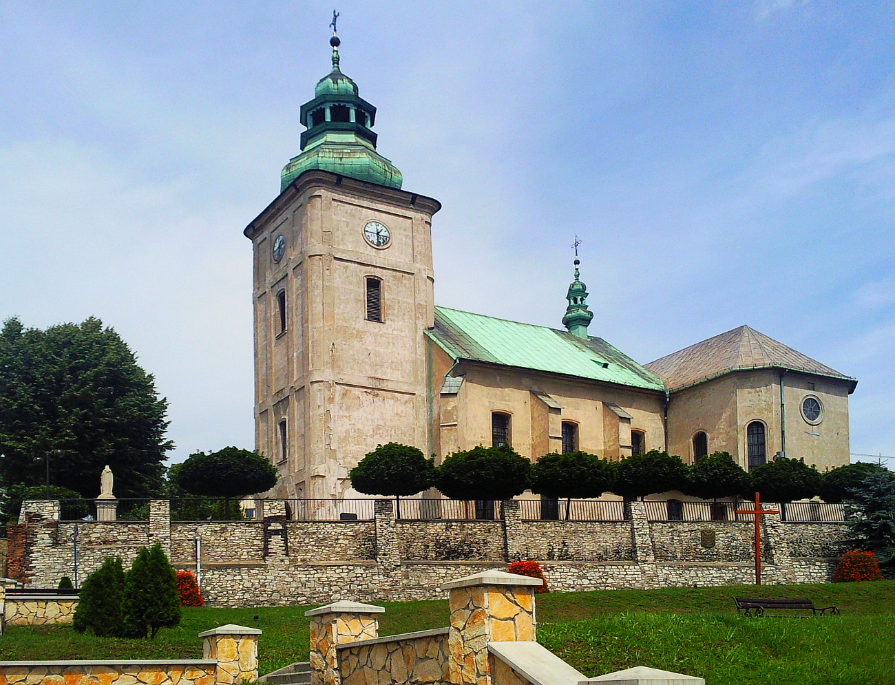 Będzin, ul. Plebańska - kościół parafialny p.w. Świętej Trójcy z XIV wieku pełnił funkcję kaplicy zamkowej powiększony w XIX wieku (zabytek nr A 4/60 z 23.02.1960)